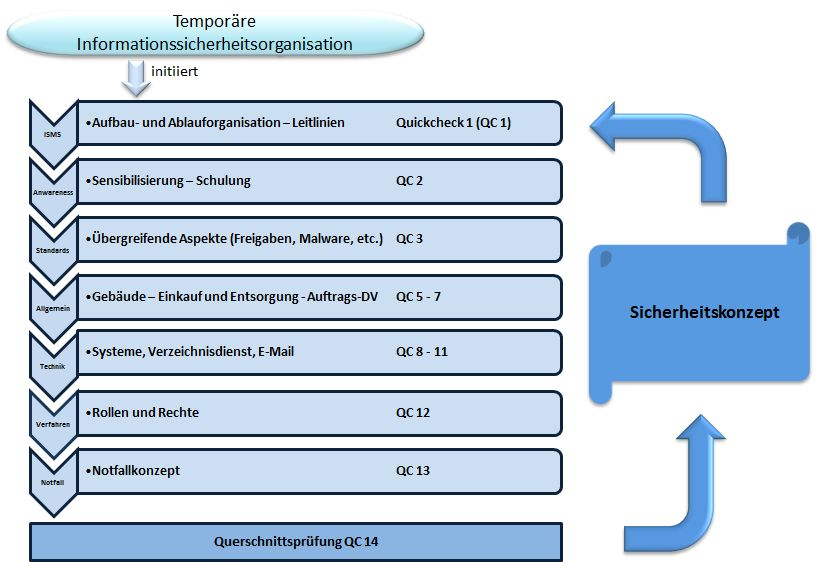 SiKoSH Vorgehensweise